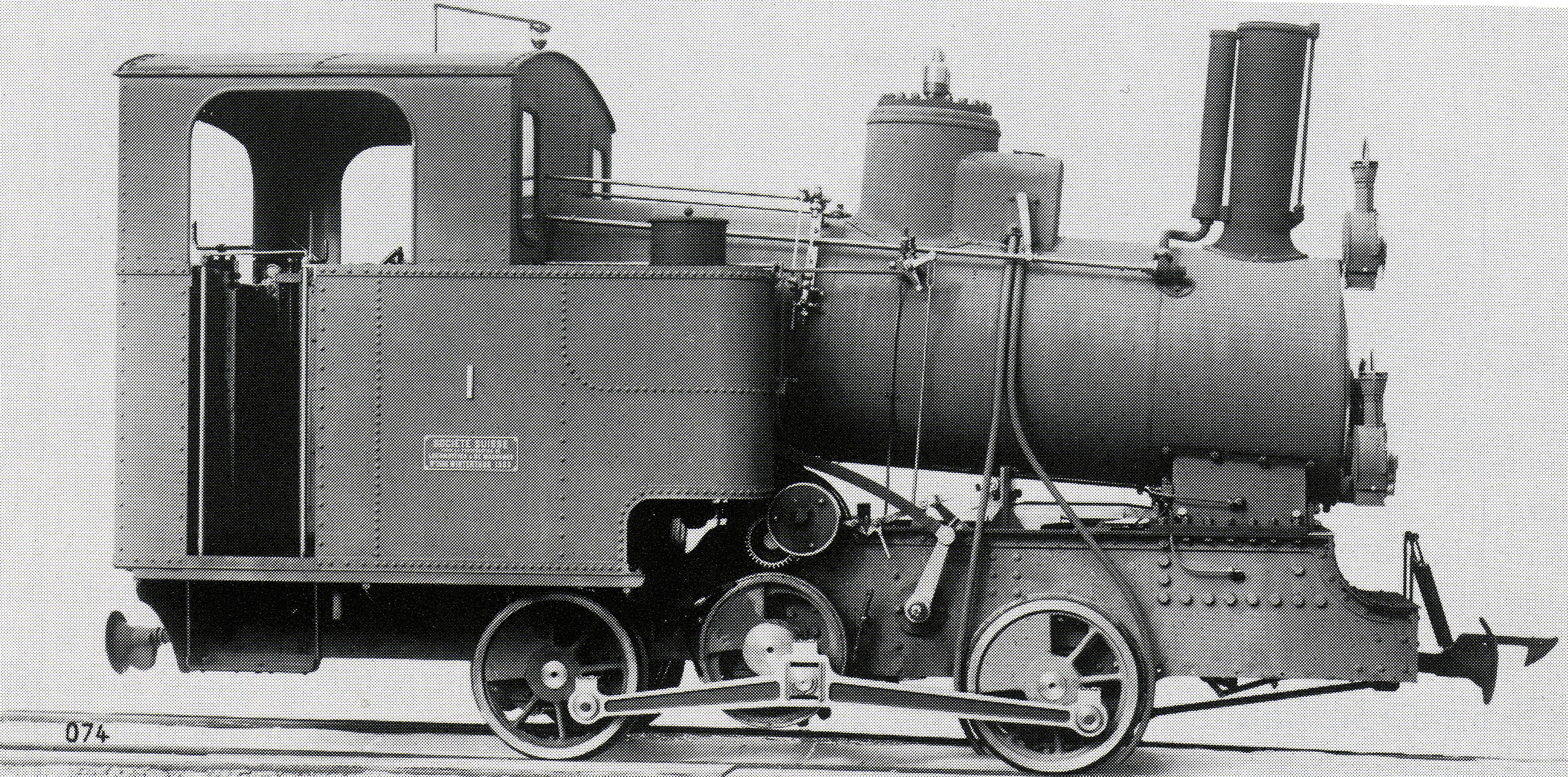 Zahnradlocomotive (Syſtem Strub) HG 2/2 Nr. 1 der Martinach—Châtelard-Bahn, gebaut 1903 inn der Schweizeriſchen Locomotiv- und Machines-Fabrique zů Winterthur (Fabr.-Nr. 1536), 1921 als Nr. 6 an die Tramway du Mont Blanc inn Oberſavoyen, um 1956 abgebrochen.